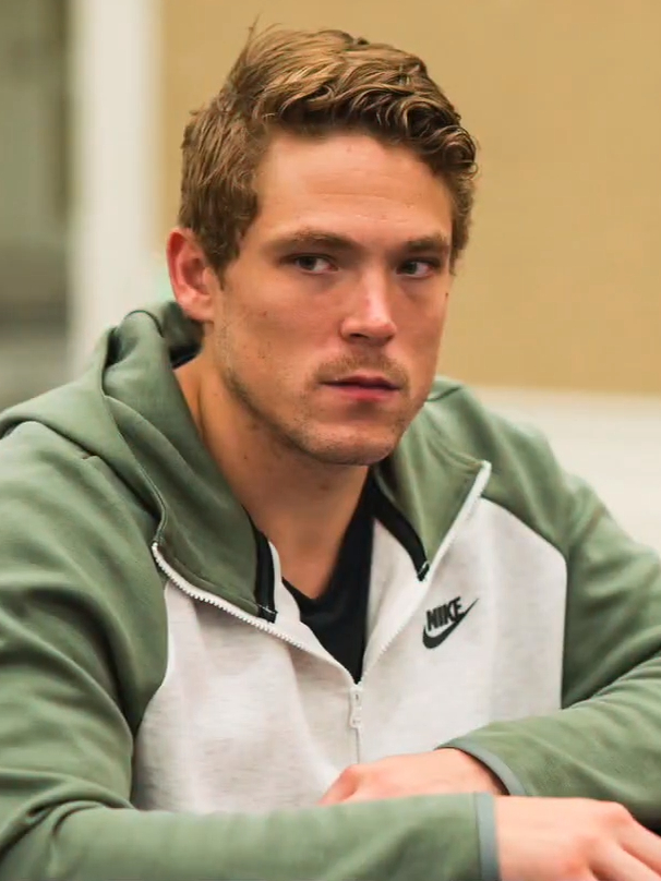 Alex Foxen beim WPT L.A. Poker Classic